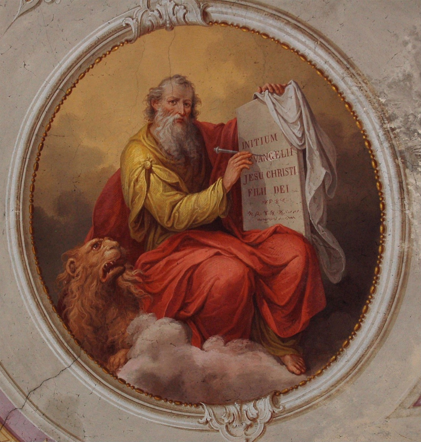 San Marco. Affresco di Luigi Tagliaferri. Chiesa di San Pietro Martire in Baruffini - Tirano - Sondrio